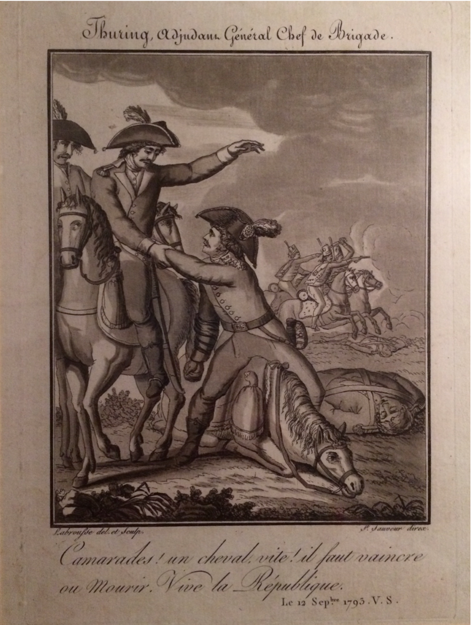 Genre iconographique : Scènes historiques -- 1789-1799 Guerre de la première coalition (1792-1797) -- Champs de bataille